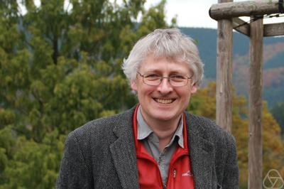 Foto di Trevor Wooley